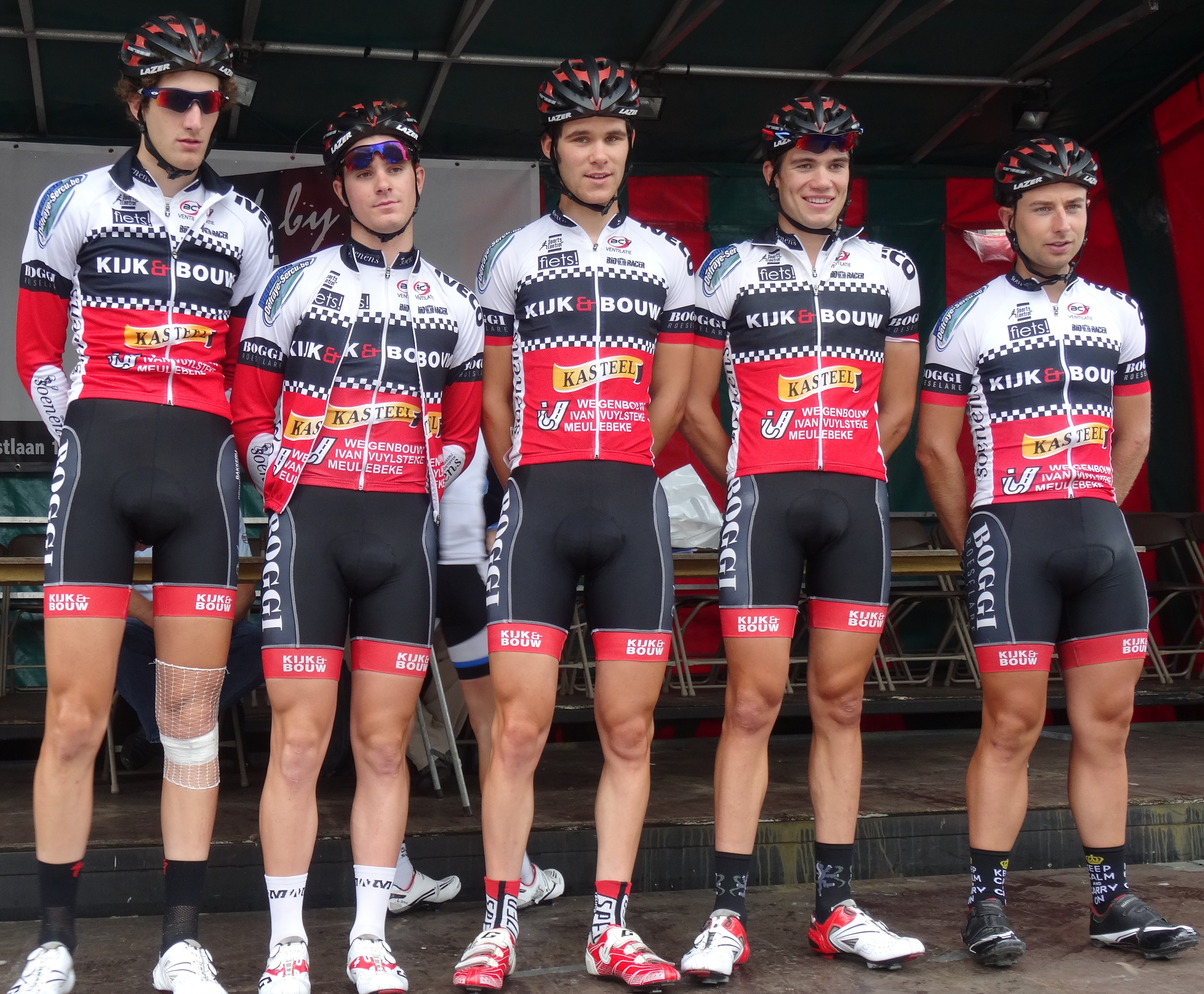 Reportage photographique réalisé le dimanche 10 août à l'occasion du départ et de l'arrivée de la Flèche du port d'Anvers 2014 à Merksem (Anvers), Belgique.